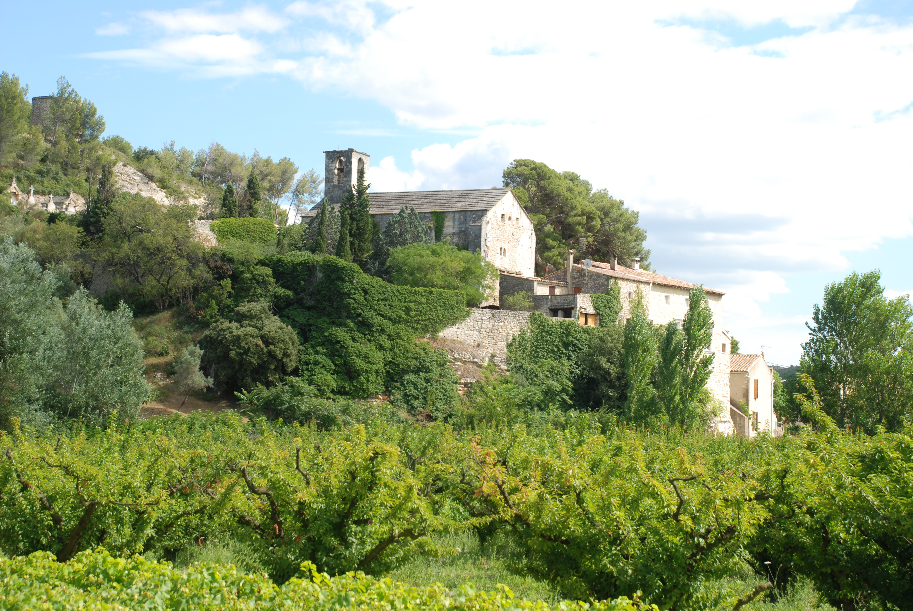 France - Provence - Boulbon - Saint-Marcellin